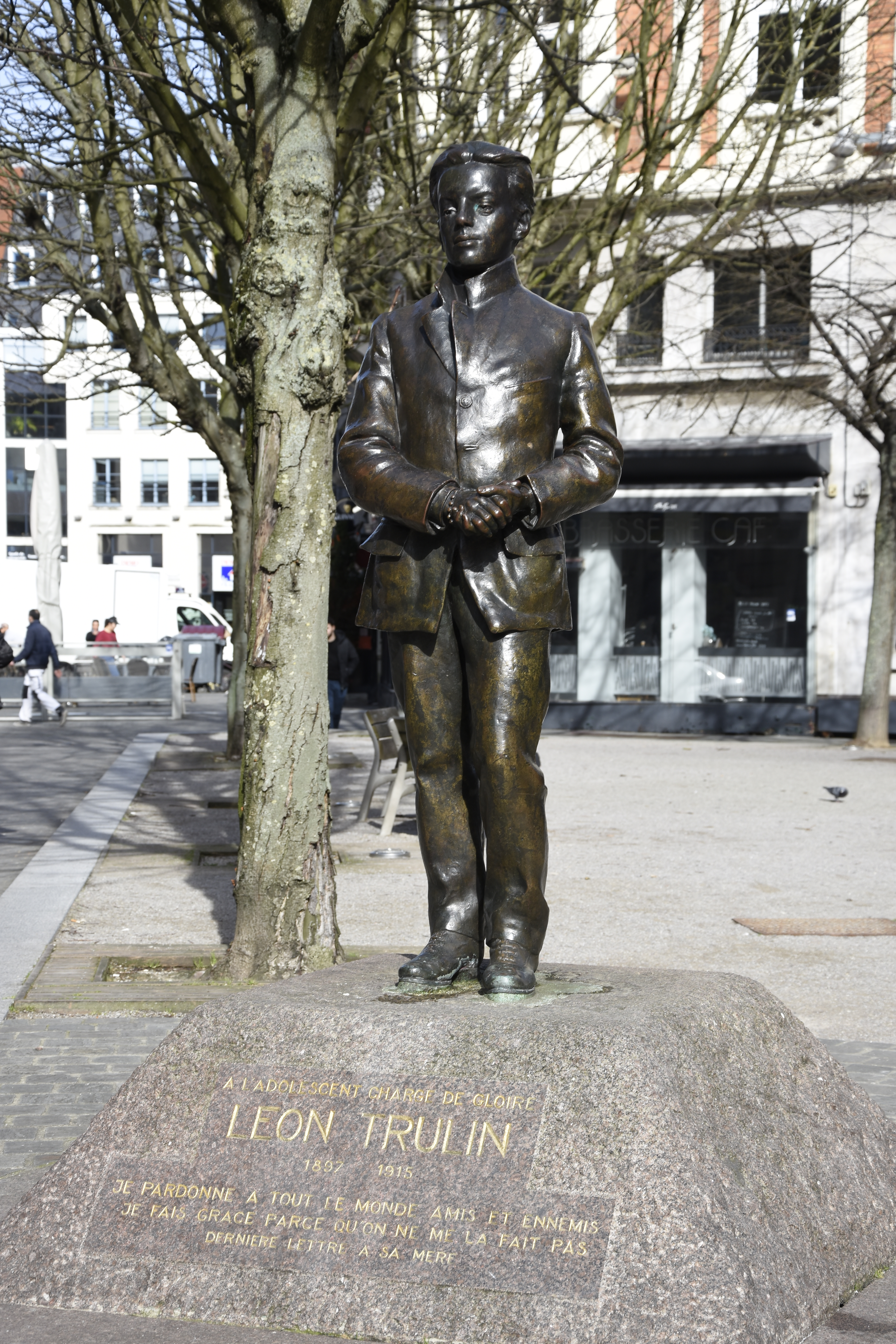 Edgar Boutry (1857-1938) - Léon Trulin te Rijsel, onthuld in 1934